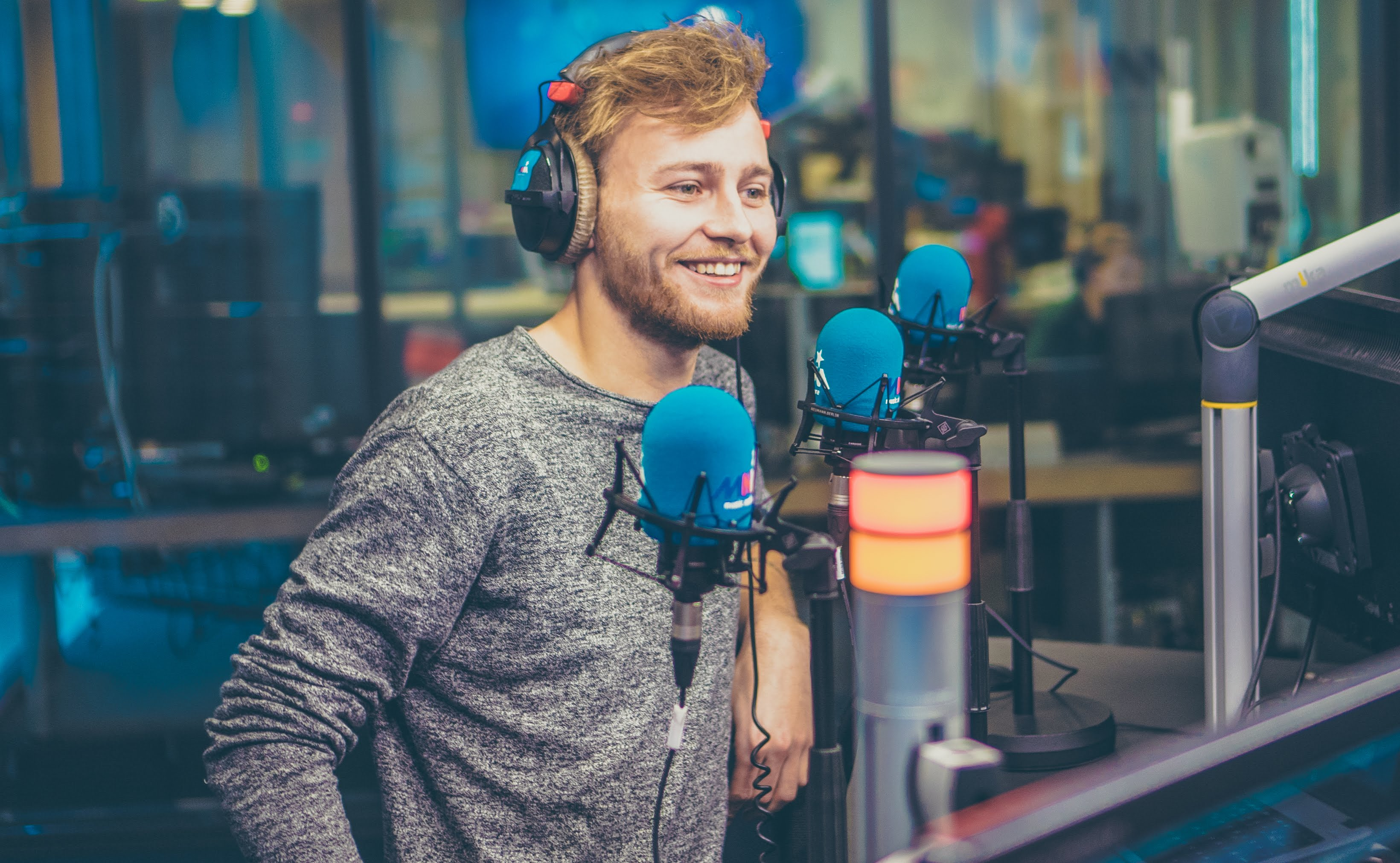 Jonas Meukens in de studio van MNM